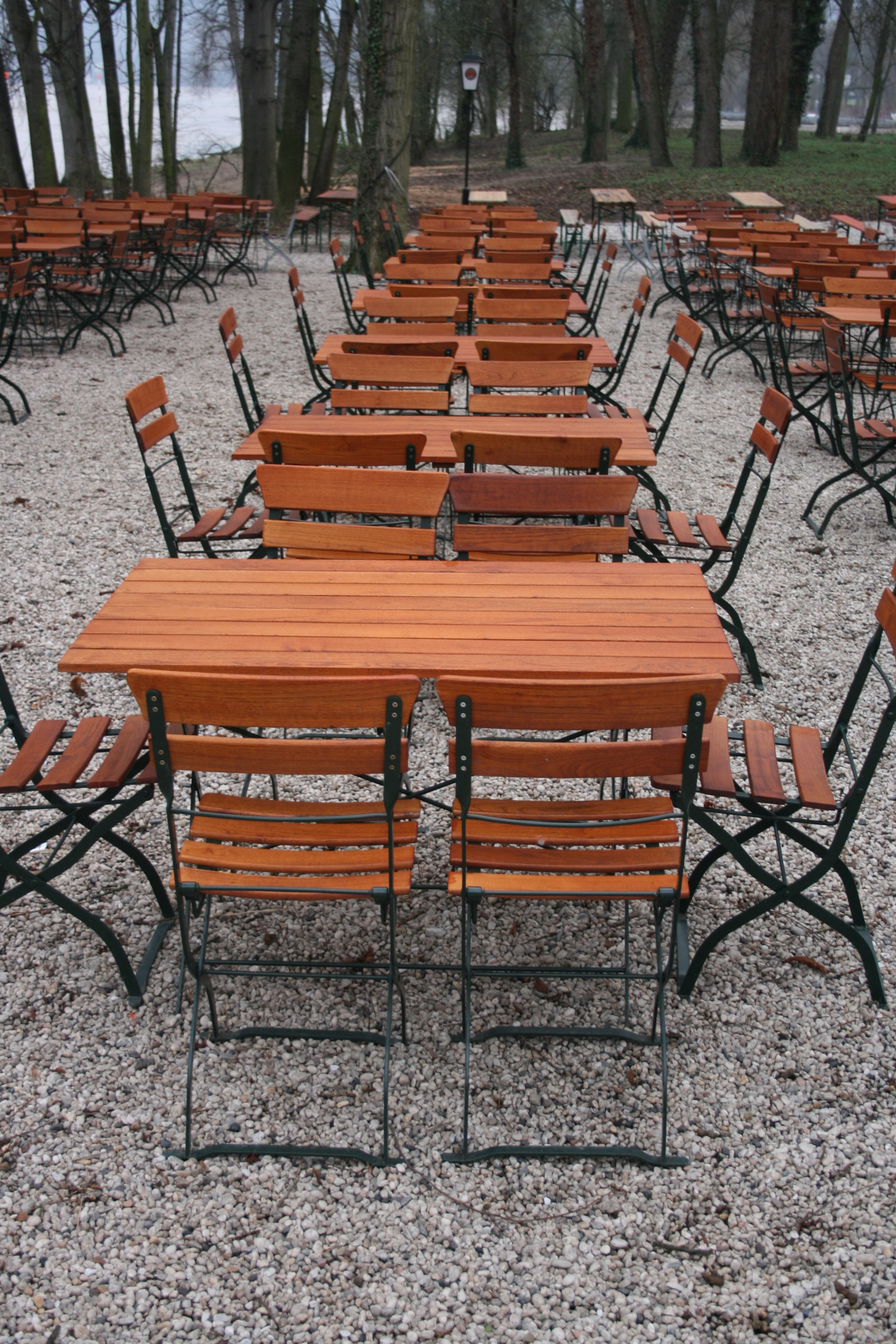 Traditionelle Holzklappstühle und -tische; Biergarten vor Saisonbeginn, Rheininsel Grafenwerth bei Bad Honnef